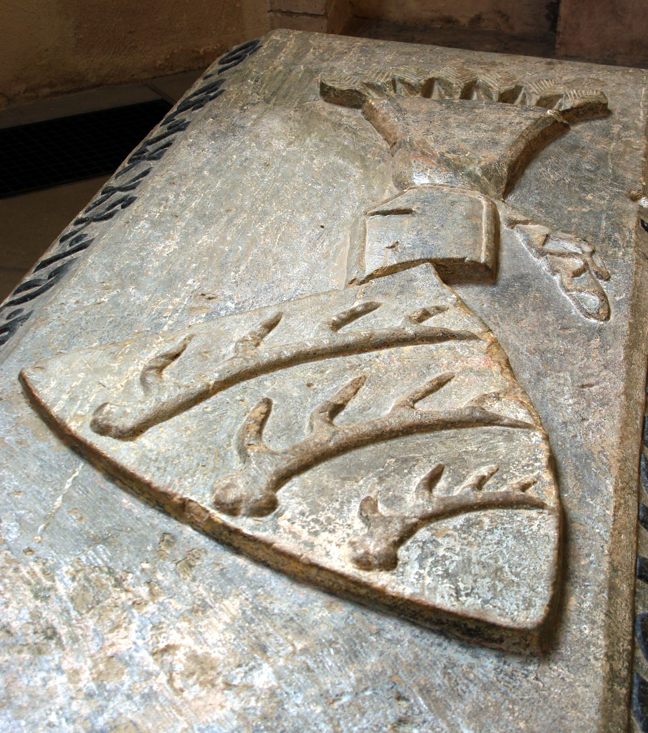 Die Grabplatte Graf Hartmanns III. von Grüningen († 4. Oktober 1280) ist der älteste Grabstein, der das württembergische Wappen mit den drei Hirschstangen trägt.